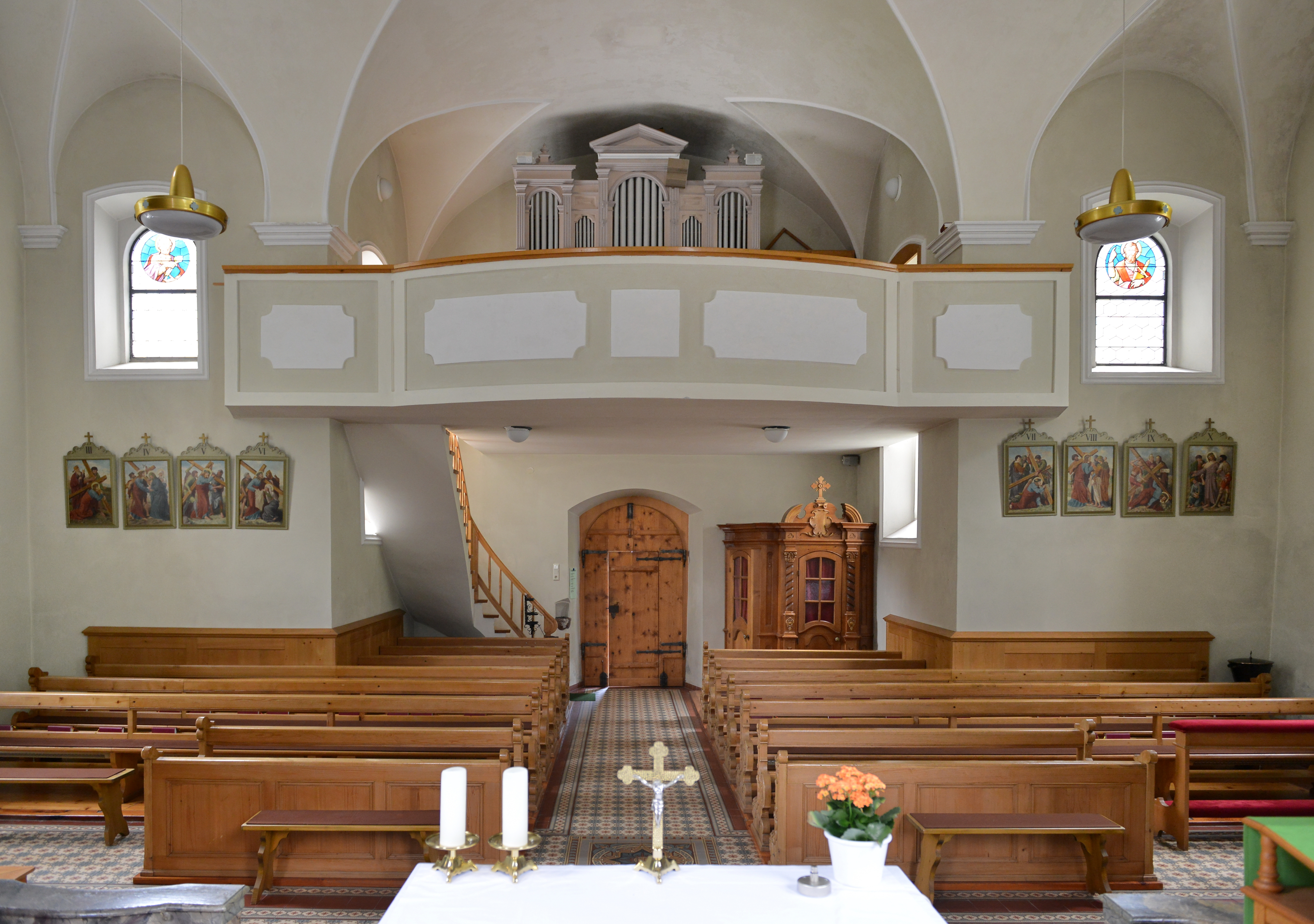 aus dem DEHIO Vorarlberg 1983: Buchbodner Pfarrkirche unserer lieben Frauen Mariä Gebut: Hochaltar, bez. 1761 (aus Bürs, 1903 aufgestellt); Viersäulen-Baldachinaufbau mit Voluntenaufsatz auf geschwungenem Grundriß mit reichem Rocailledekor; anstelle des Gemäldes Figur Immaculata (aus Hörbranz), Oberbild Guter Hirte, von Anton Jehly; 1903, Figuren unter Baldachin li. hl.Anna, re. hl. Josef von Gebhard Moosbrugger, 1903-1905; Gebälkengel und Putten, Johann Ladner zugeschrieben, 1761. - Tabernakel mir Rocailledekor, 1761.